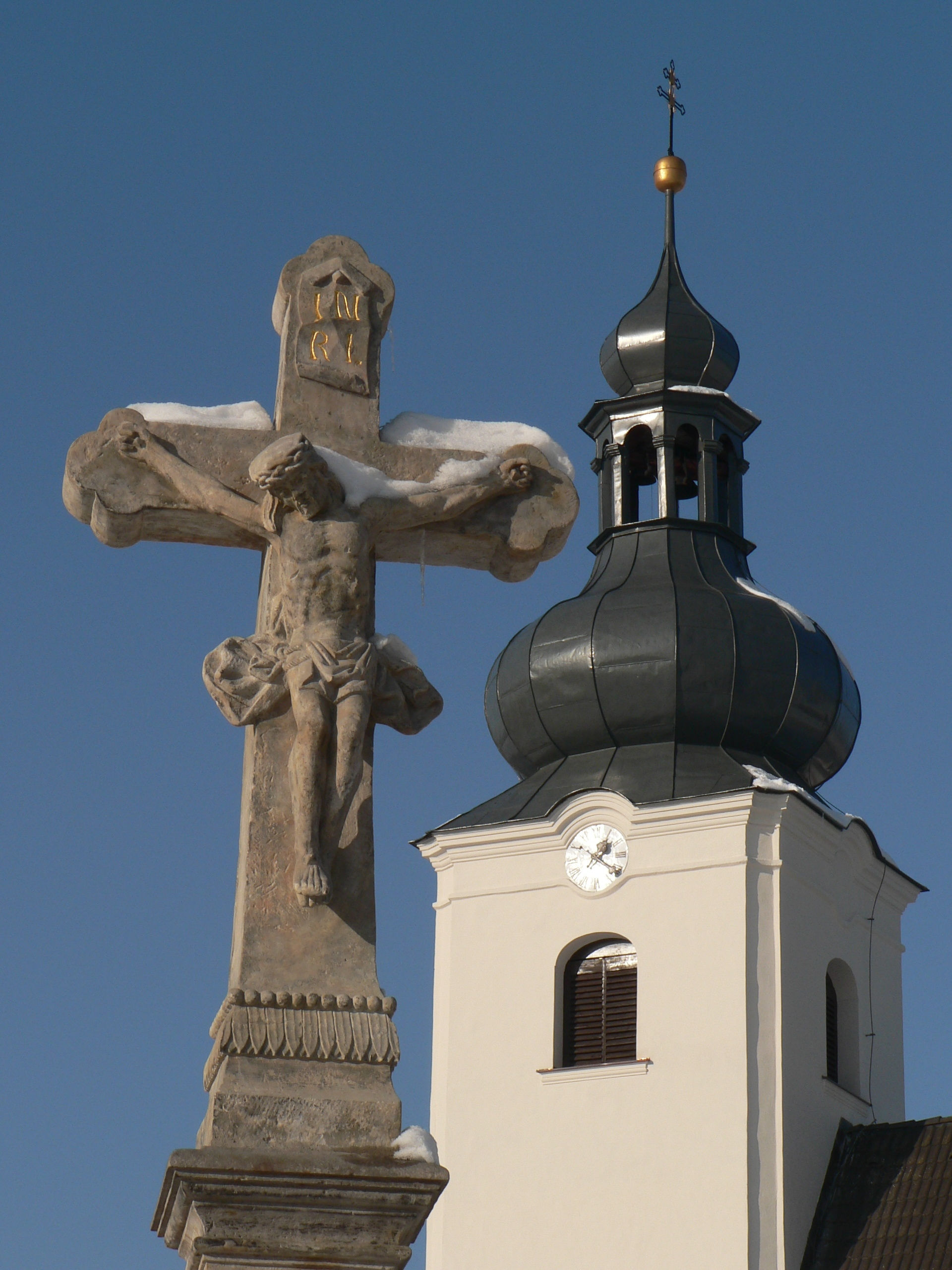 Kostel svatého Vavřince (Sobotín) - kříž u kostela